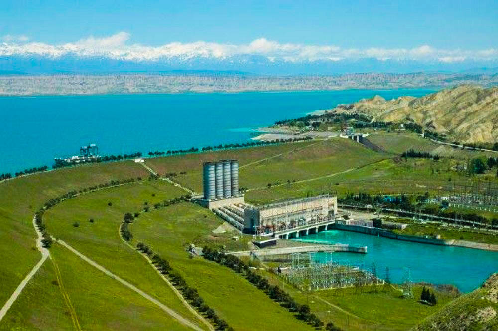 Mingəçevir SES ümumi görünüş